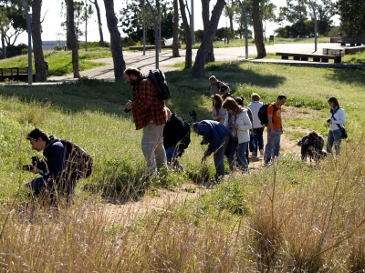 Testing de Biodiversitat Virtual a Gavà (19/04/2009)